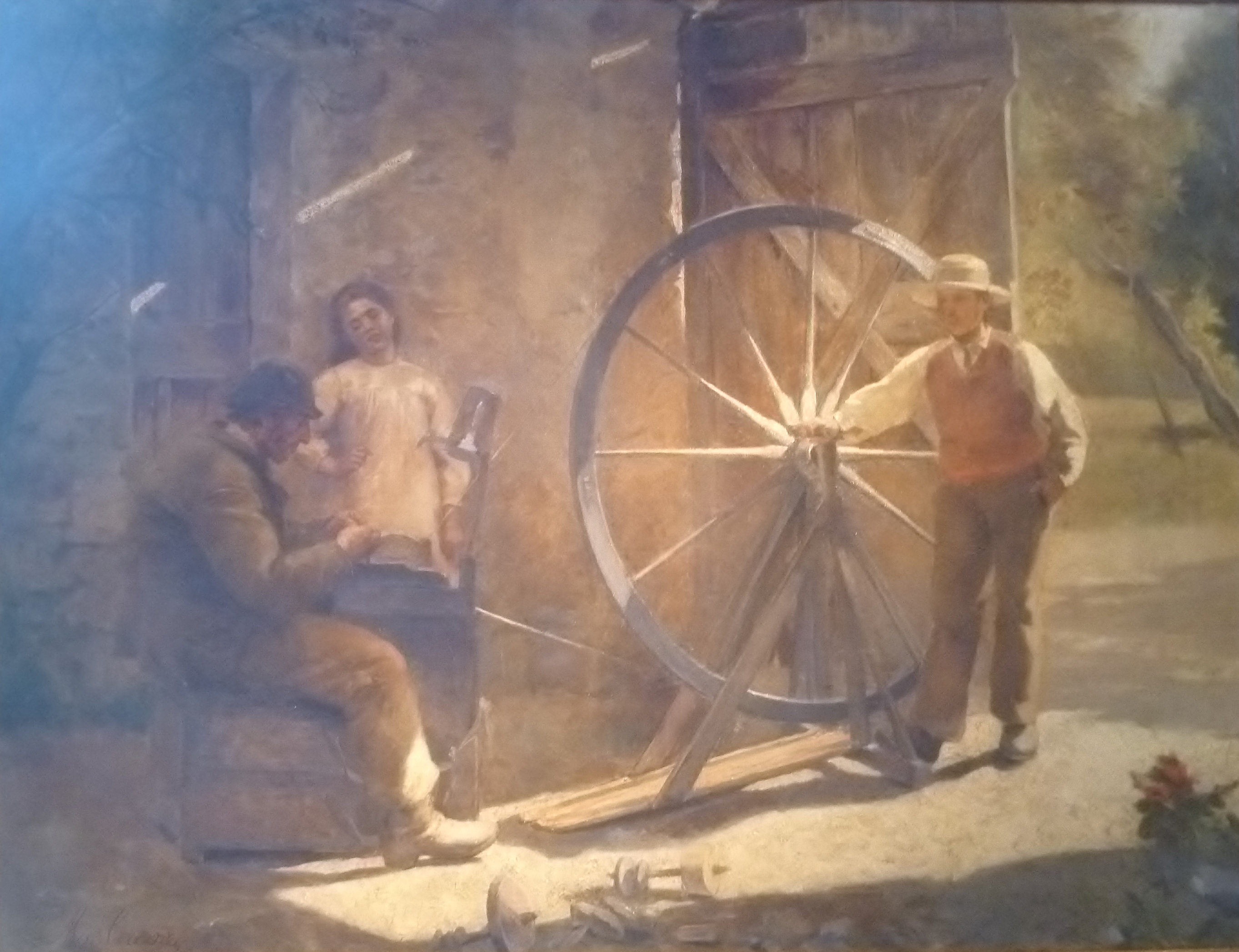 Le rémouleur (1898) par Marie Caire-Tonoir; huile sur toile 80 x 116 cm; collection particulière